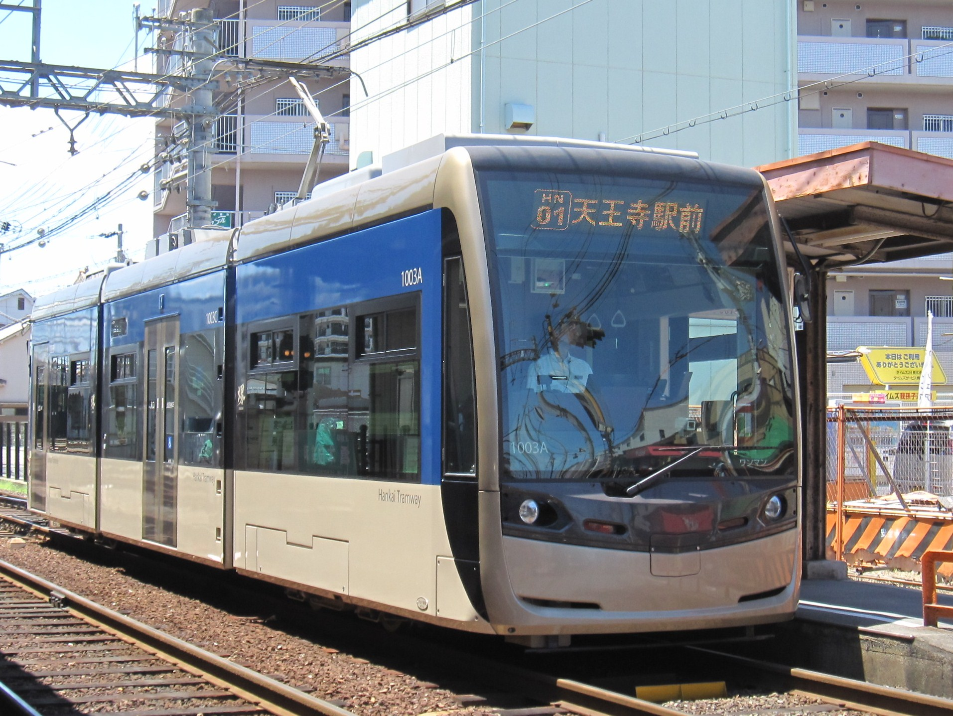 阪堺電気軌道1003(我孫子道停留場にて)